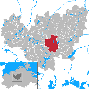 Lalendorf in Mecklenburg-Vorpommern - District Güstrow